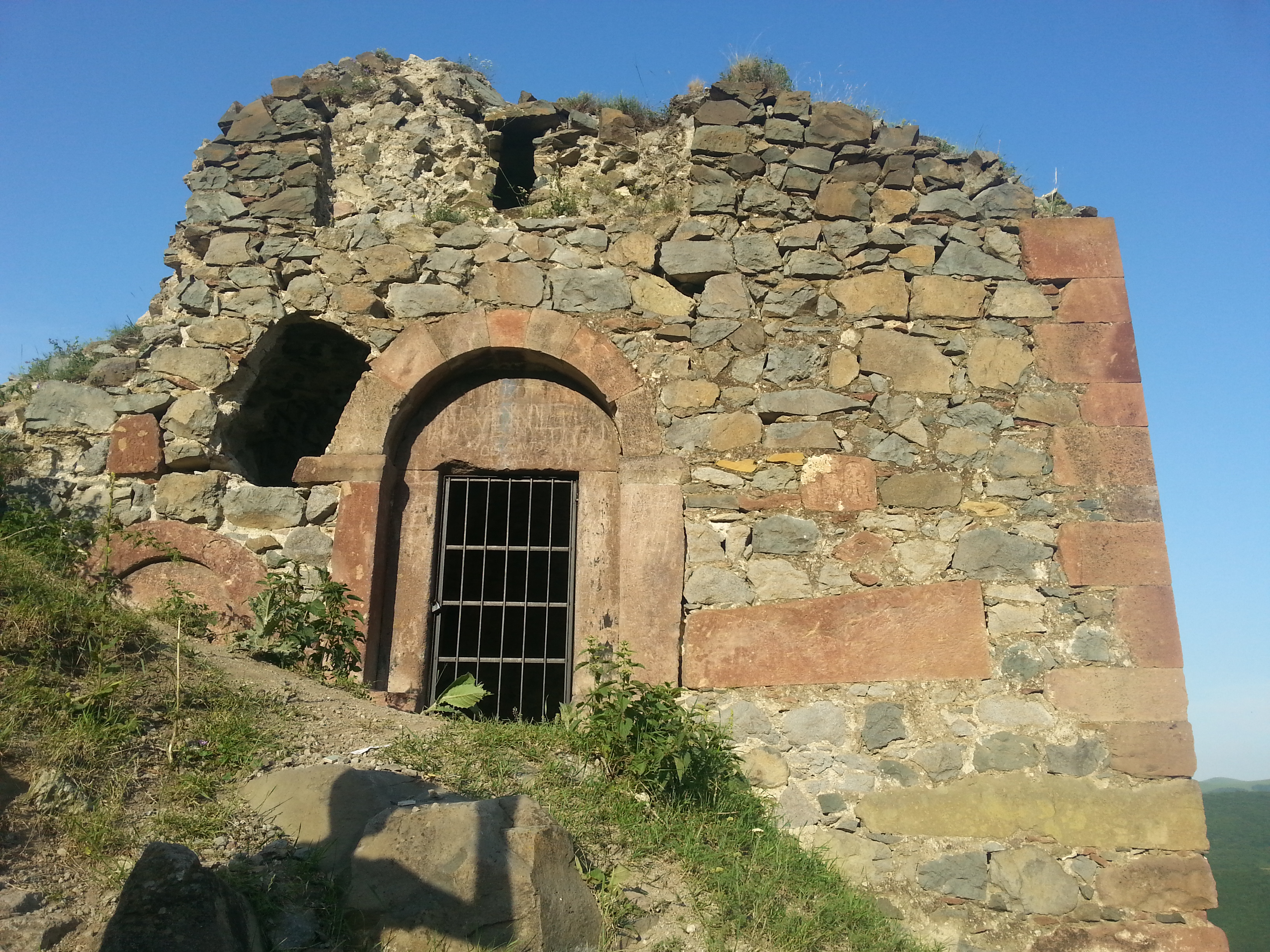 Yeni Zod Alban məbədi Yeni Zod Alban məbədi Göygöl rayonunun Yeni Zod kəndi yaxınlığında yerləşən Qədim Alban məbədlərindən biridir. Hündür qayalıq üzərində tikilmişdir. Bu məbəd tikiliş quruluşuna görə orta əsrə aid etmək olar. Bu kilsənin üzərində albanlara məxsus çoxlu xaç işarələri və bir Alban əlifbası ilə yazılmış kitabəsi vardır. Məbədin interyerində hücrə yeri vardır, 2 neflidir və içərisində də çoxlu albanvari xaç oymaları vardır. Məbəd əsasən sərt çay və qaya daşı birazda tuf daşından tikilibdir. Məbəd qəzalı vəziyyətdədir.